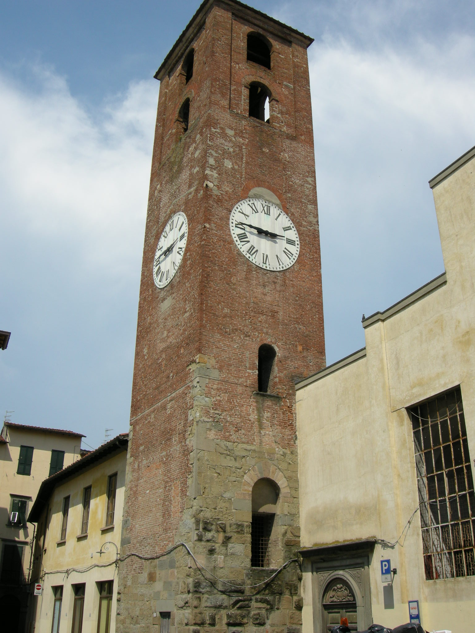 Lucca torre presso il mercato